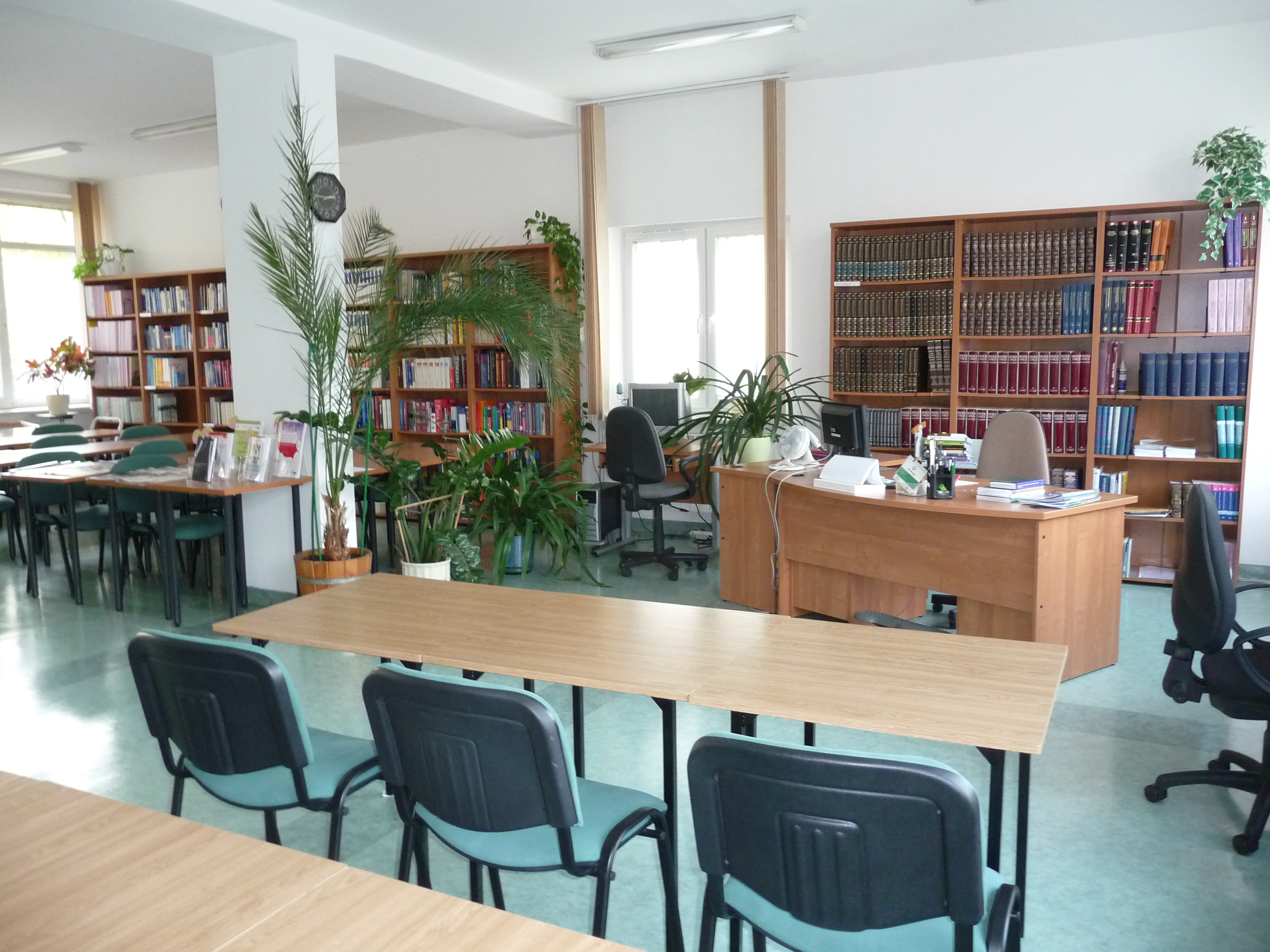 Czytelnia na Limanowskiego 23